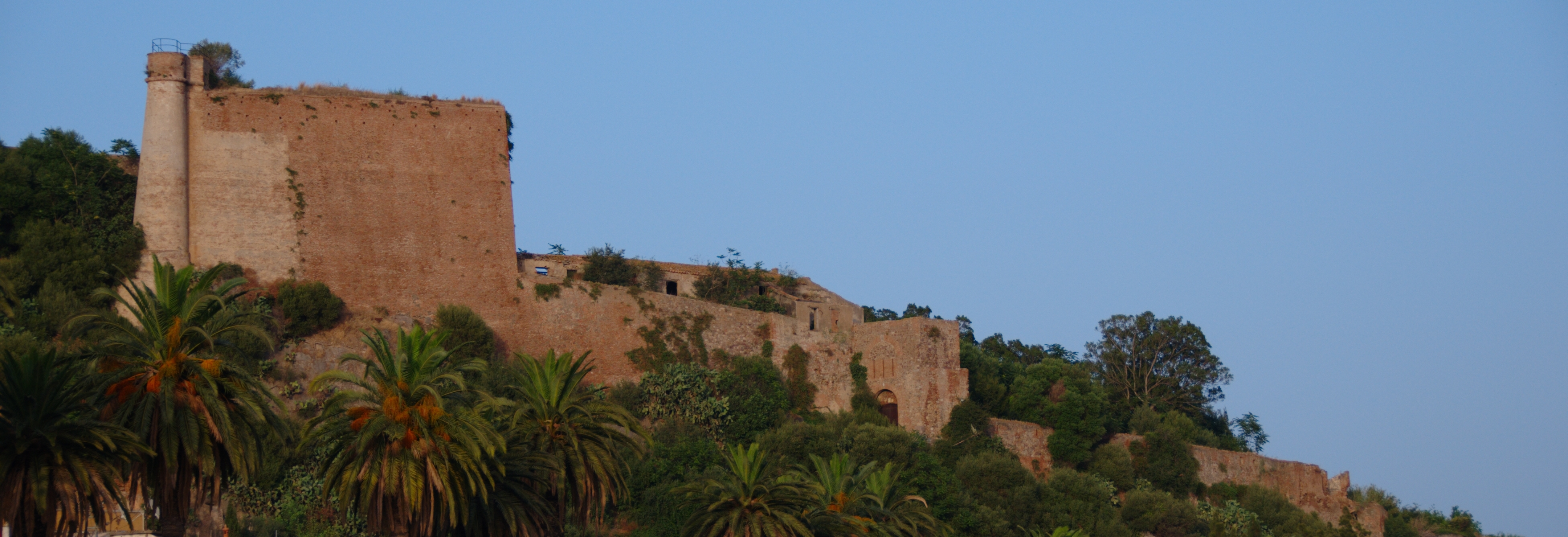 Fort au dessus du Port de Béjaïa